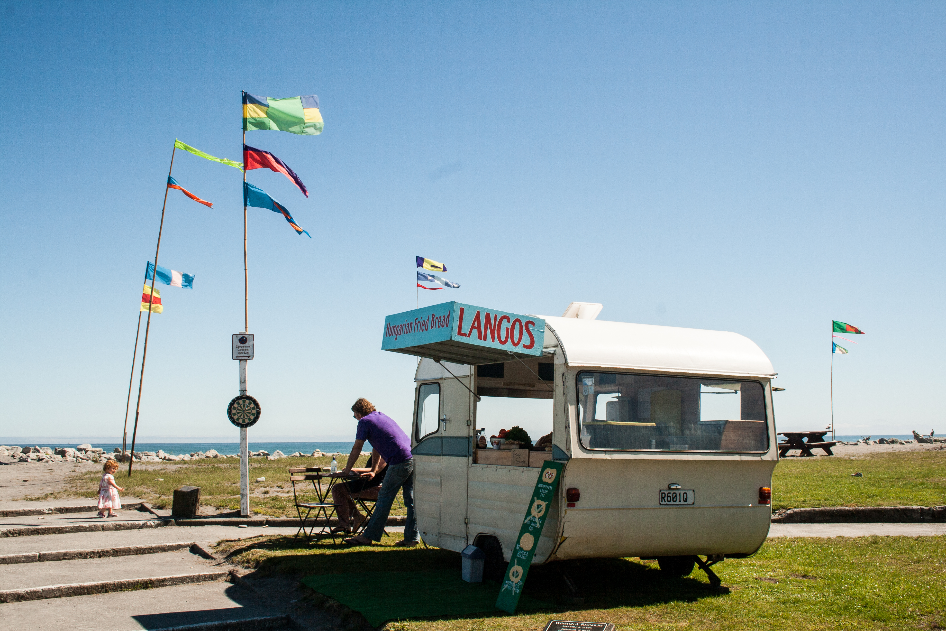 Selling Hungarian Langos in Hokitika, New Zealand